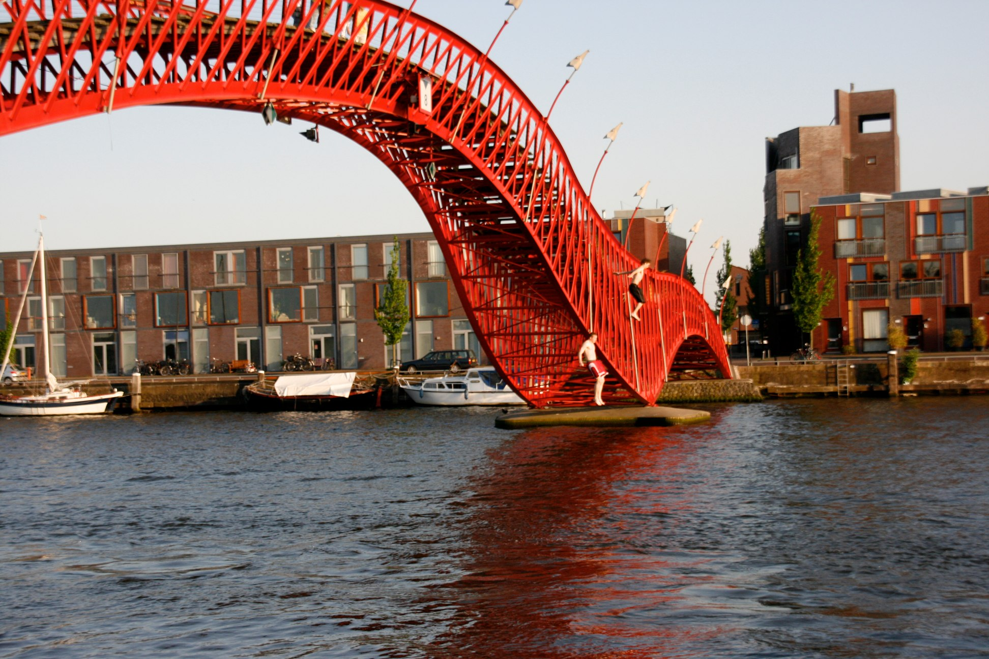 Pythonbrug - Stuurmankade, Amsterdam